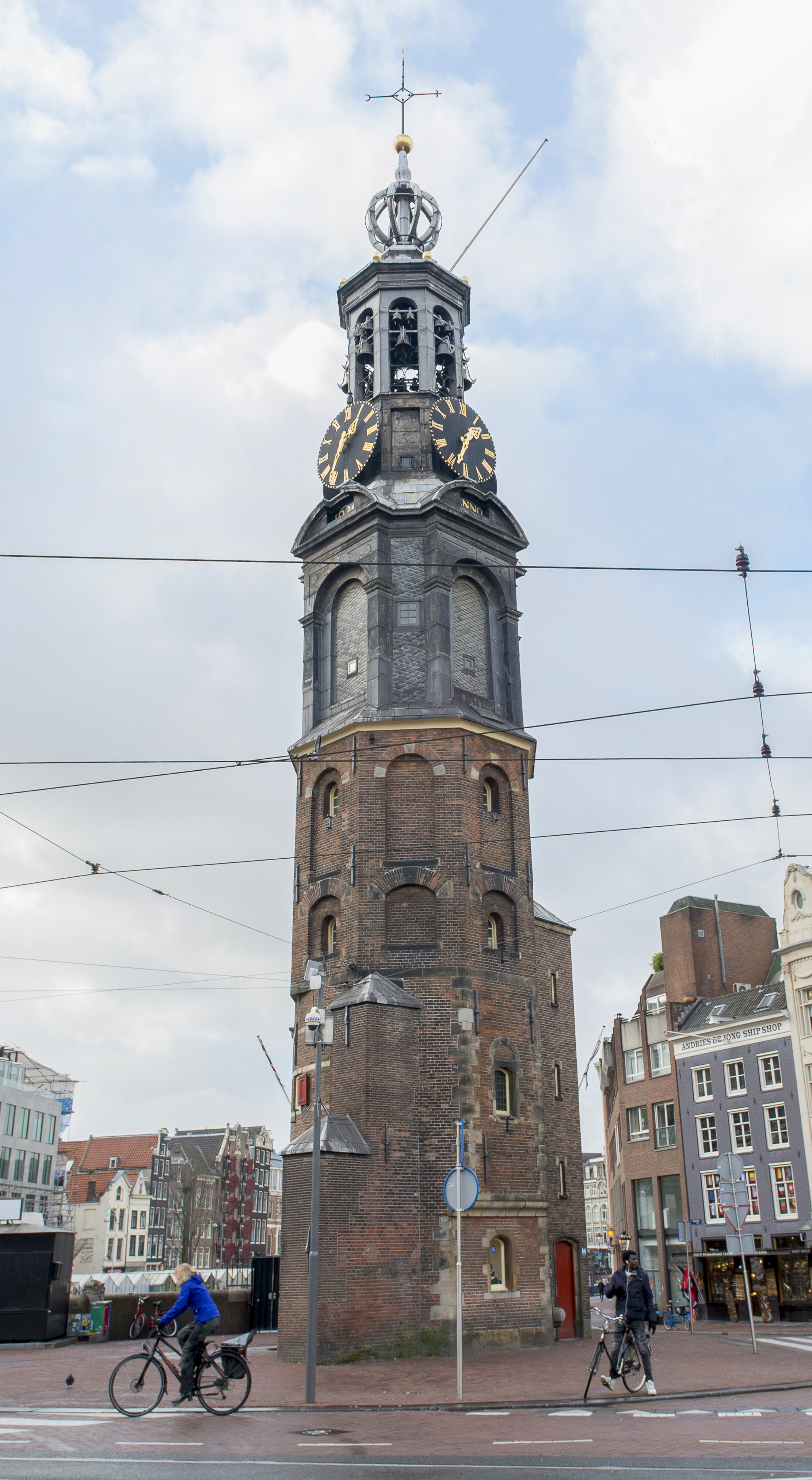 Munttoren, torre con relojes.